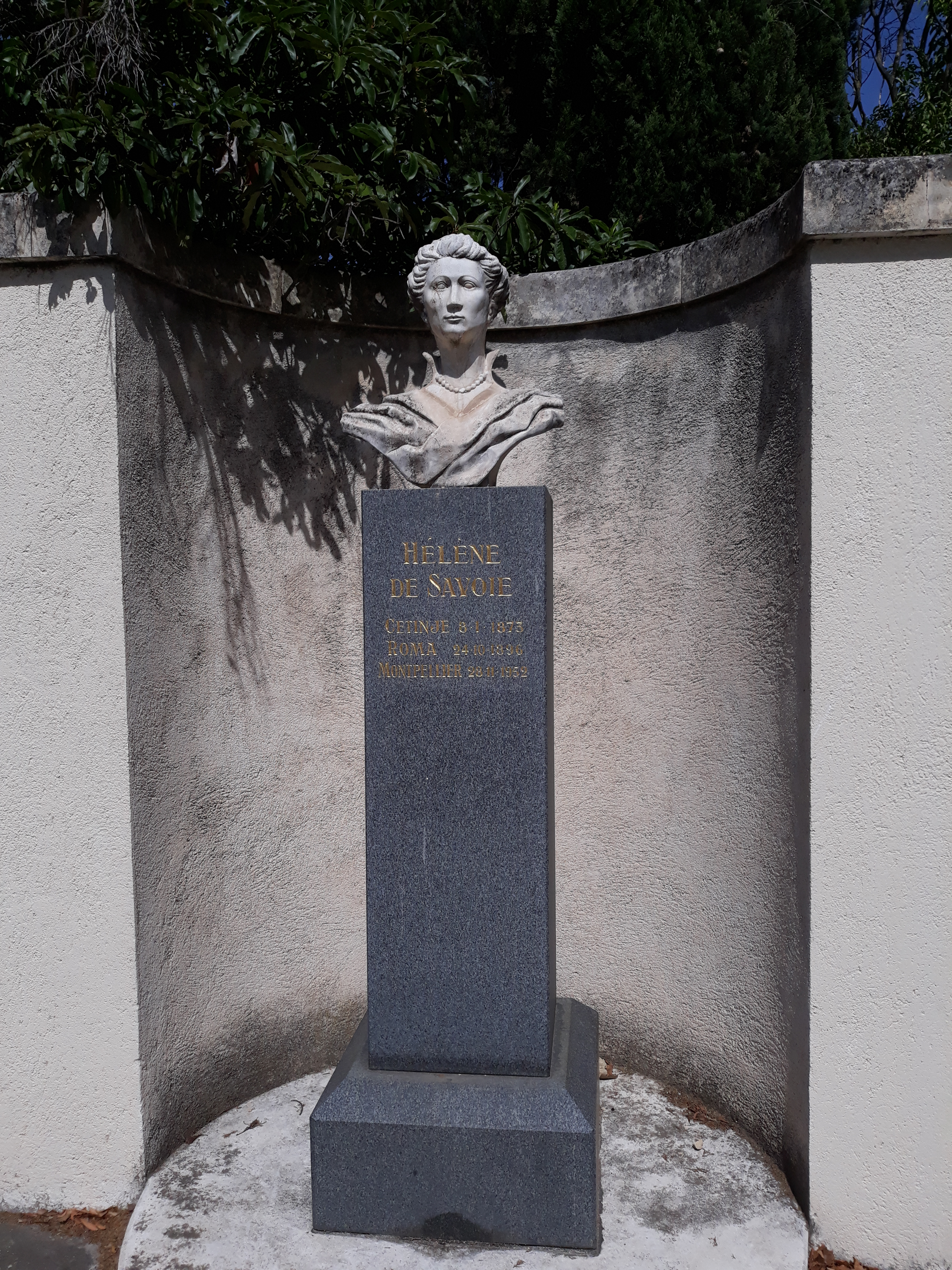 Denkmal der italienischen Königin Elena in Monpellier (Hérault).